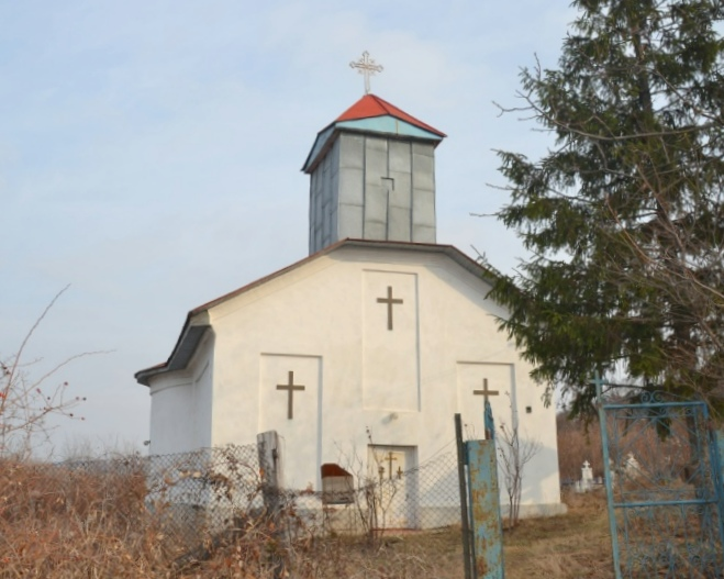 Biserica „Sfântul Gheorghe”, sat Dunărea Mică; comuna Devesel În centrul satului mijl. sec. XIX